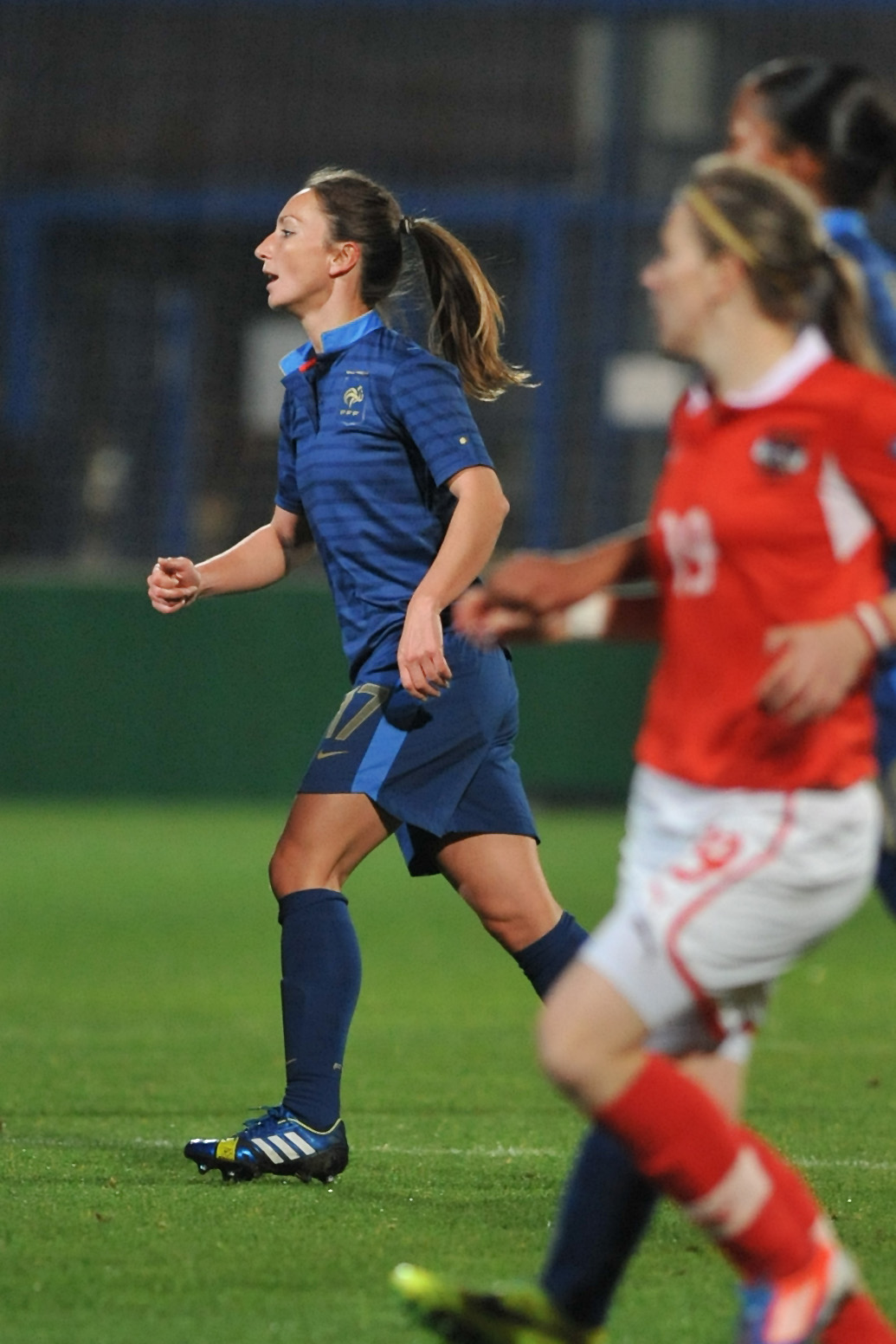 FIFA Women's World Cup 2015 Qualiying Round Österreich - Frankreich am 31. Oktober 2013 in Ritzing: Gaëtane Thiney